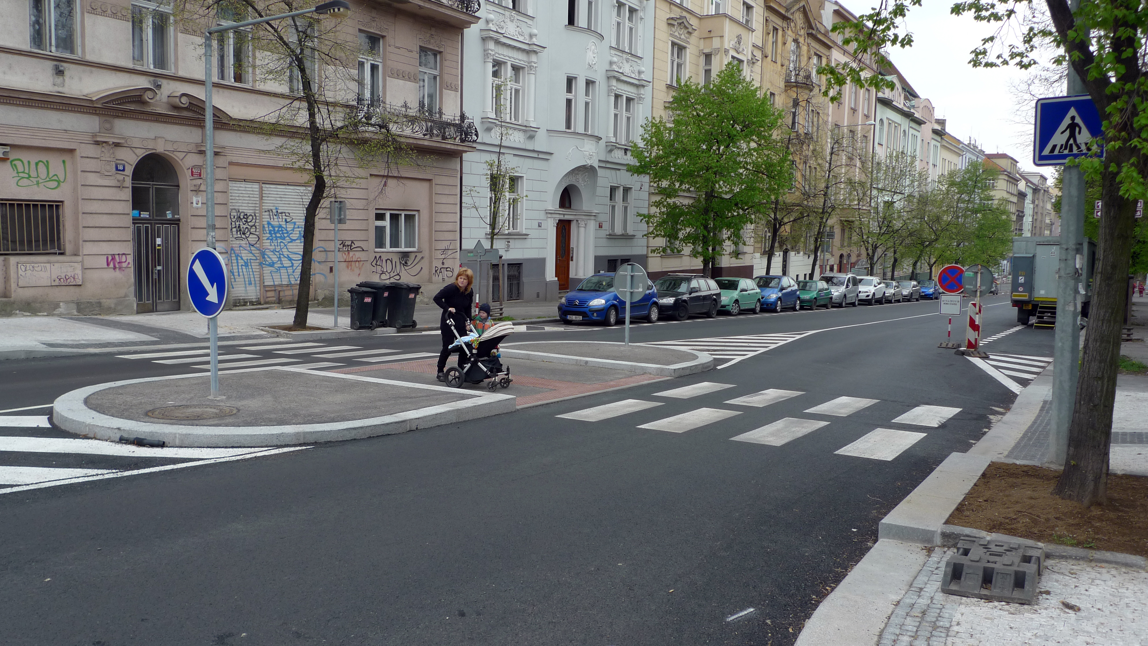 Praha 10, křižovatka ulic Ruská x Estonská - ostrůvek pro chodce uprostřed přechodu